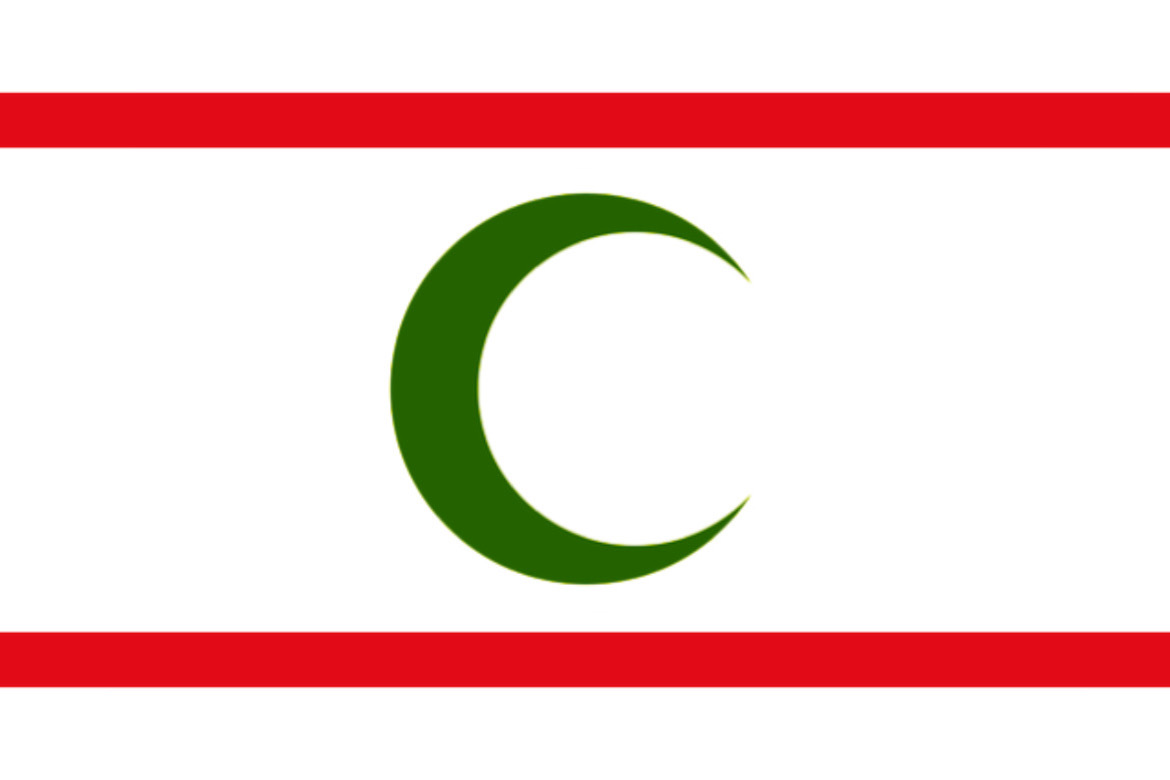 پرچم جنبش شاخ